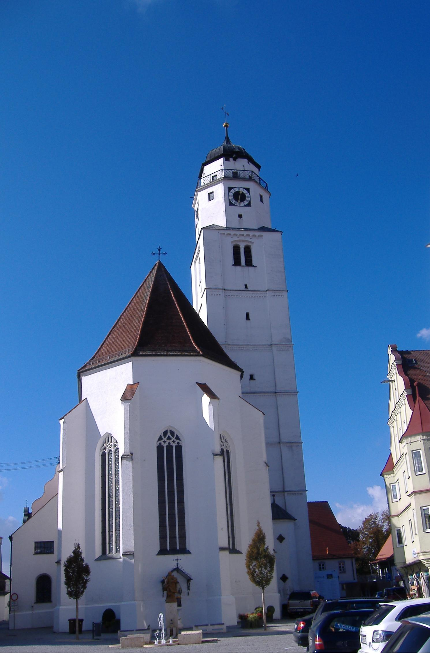 Höchstädt